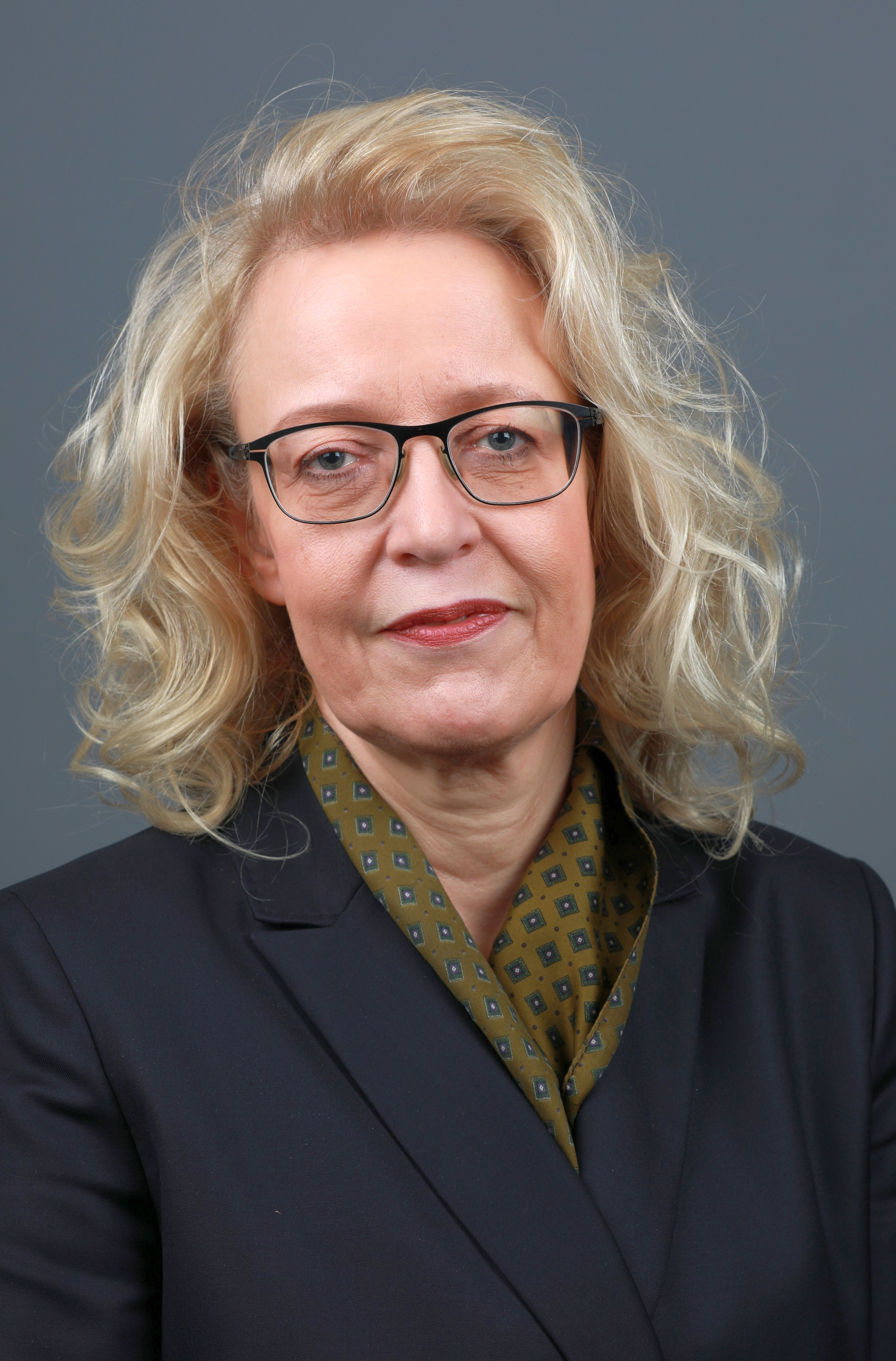 Sibylle Meister (FDP)